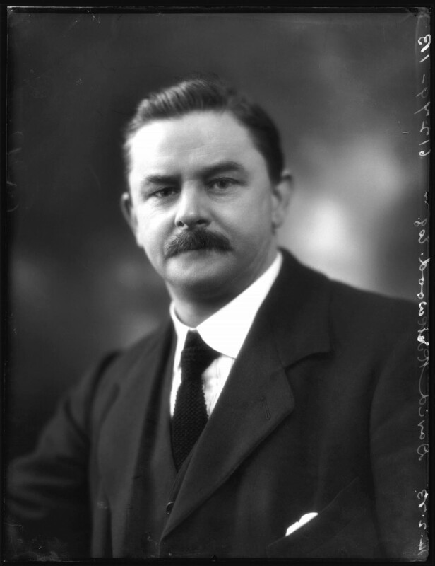 Lord Kirkwood